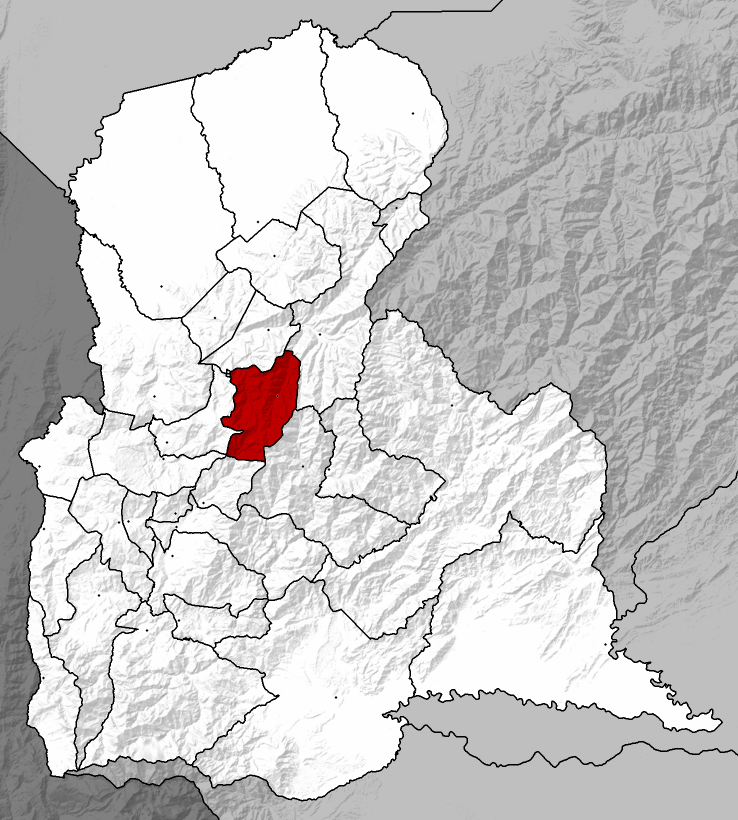 Municipio José María Vargas - Táchira